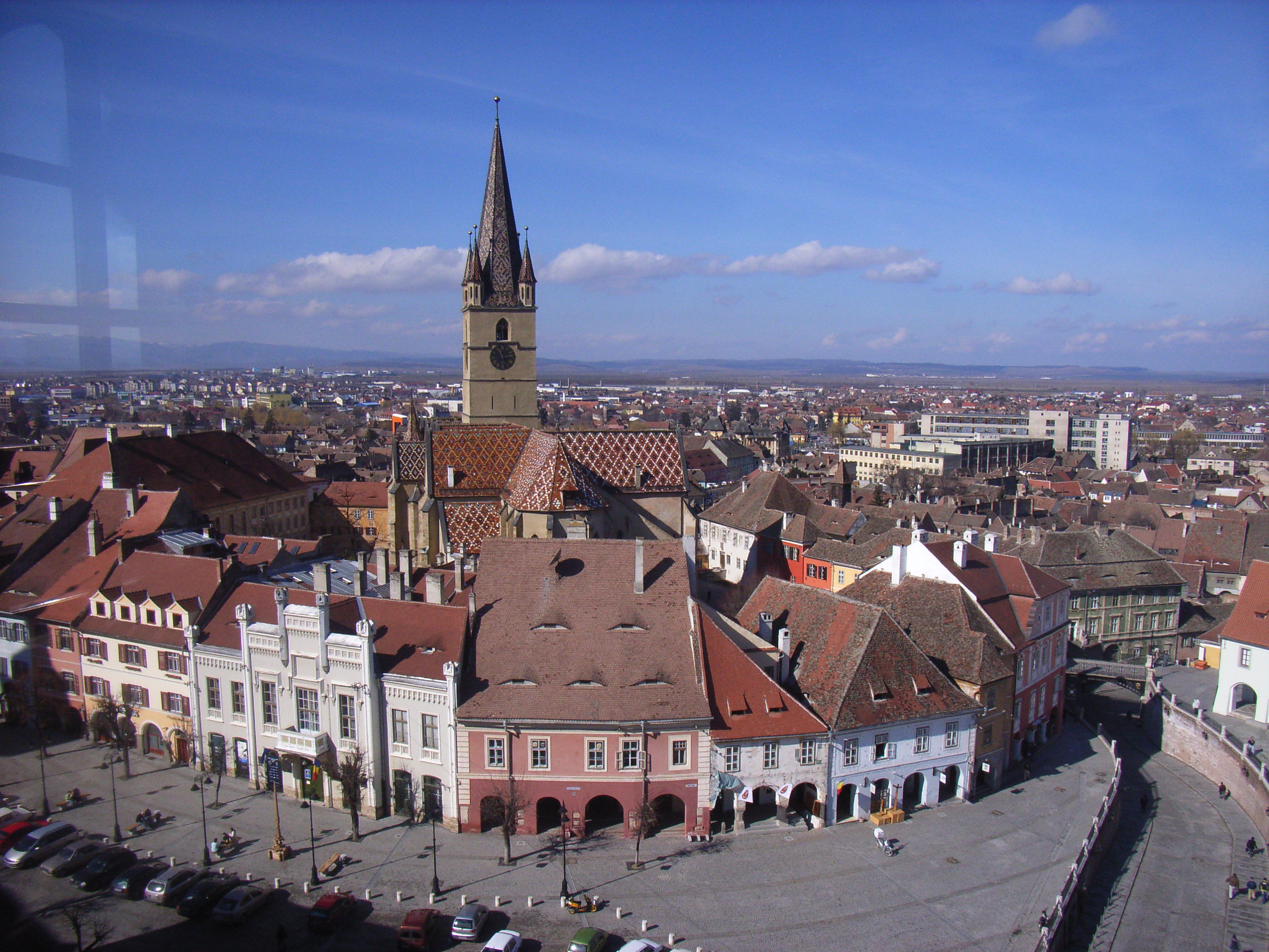 Sibiu-Hermannstadt, der Kleine Ring, die Stadtpfarrkirche und die Bürgergasse mit der Lügenbrücke